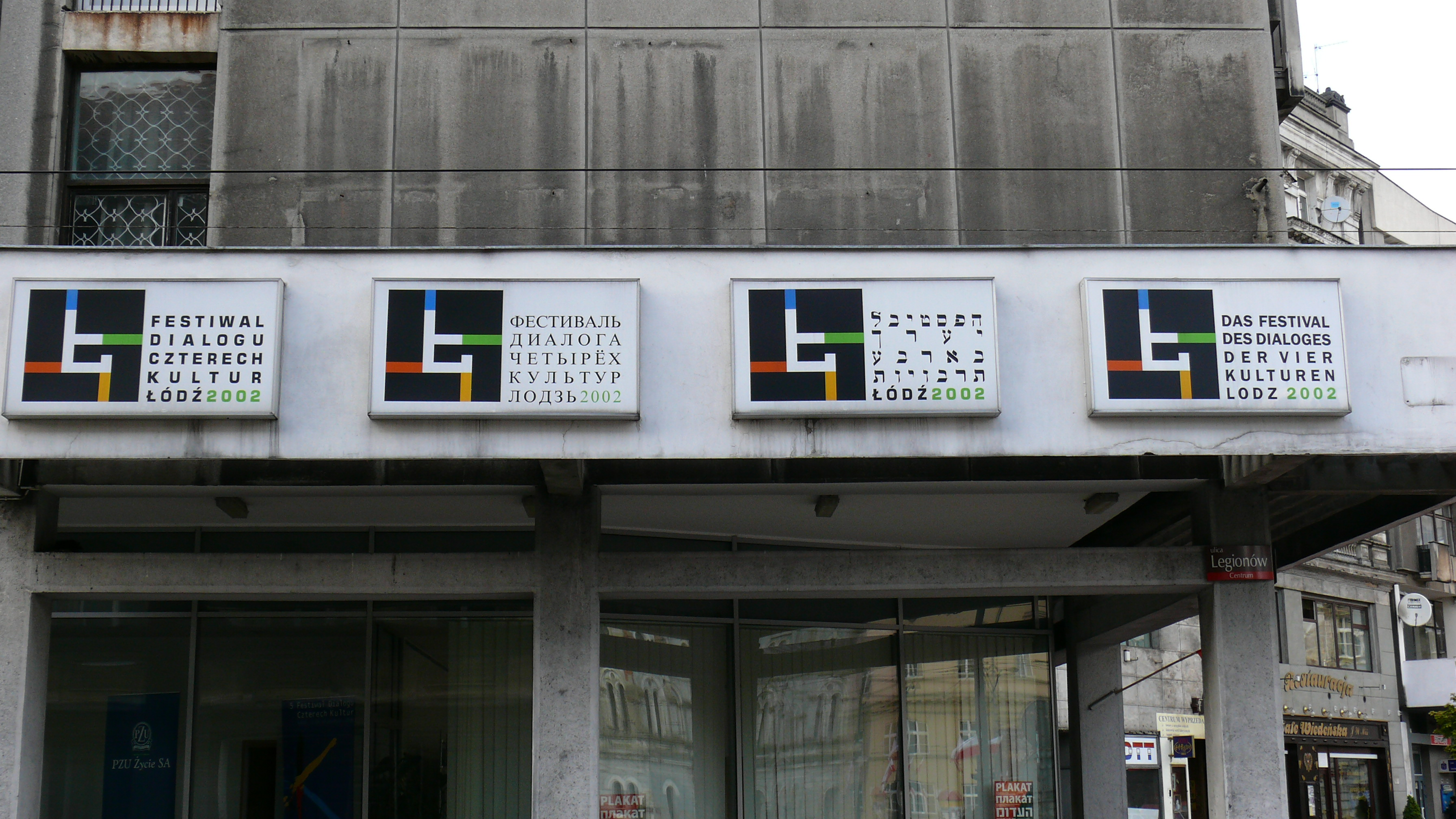 Festiwal Dialogu Czterech Kultur w Łodzi